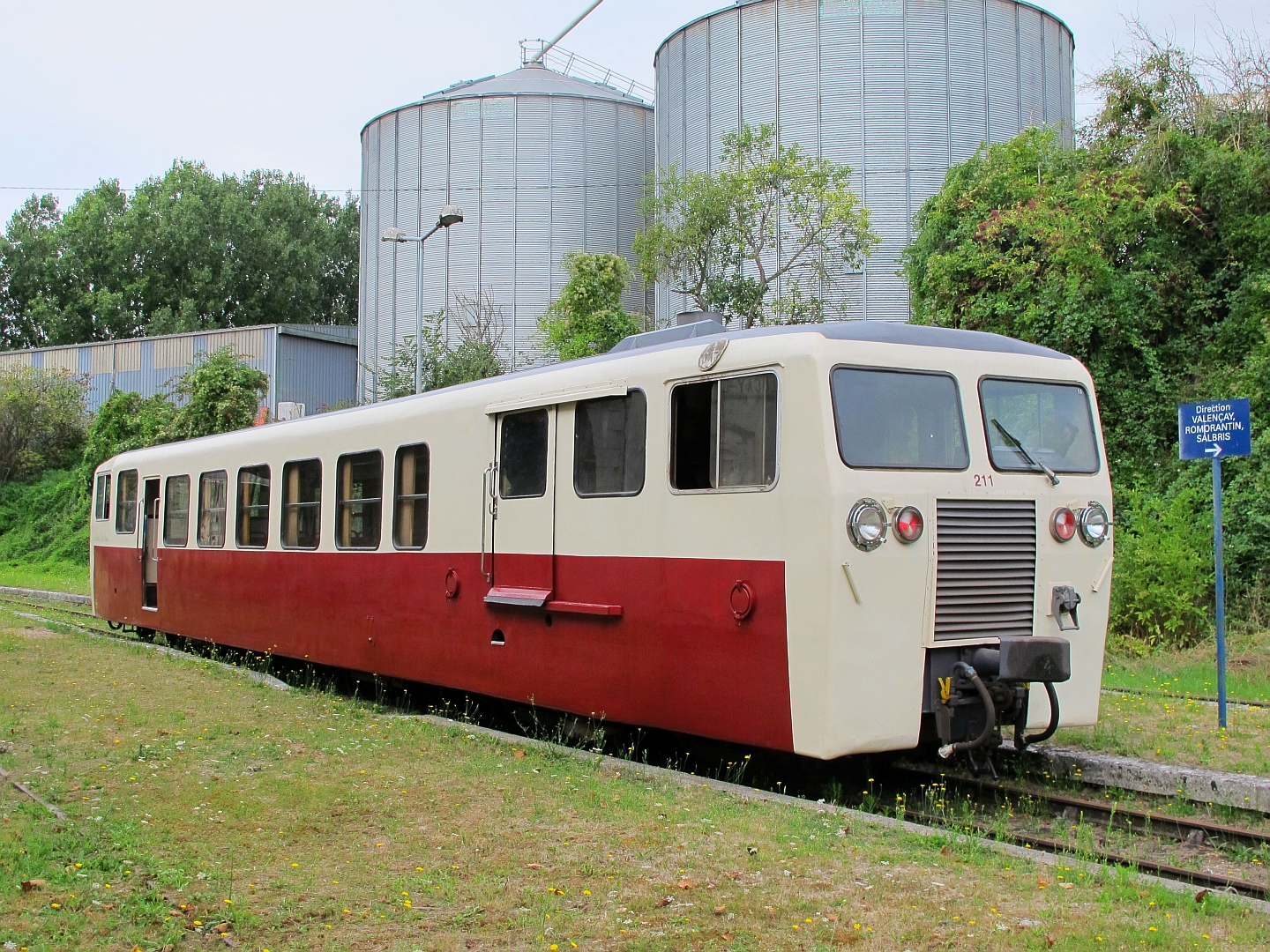 L'autorail Verney X211 en gare de Luçay-le-Mâle le 23 août 2015.